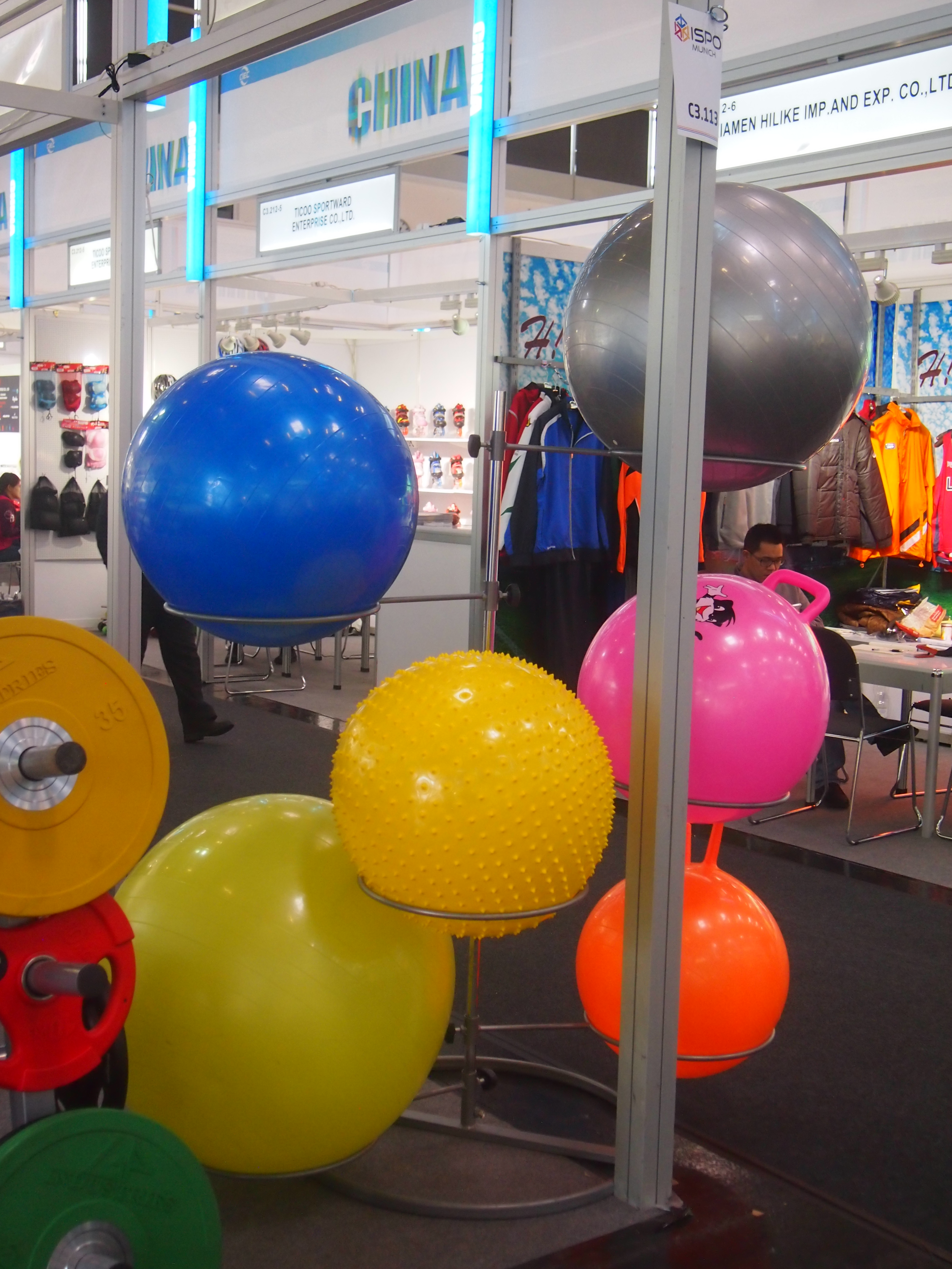 Verschiedene Gymnastikbälle auf der ISPO 2014 in München